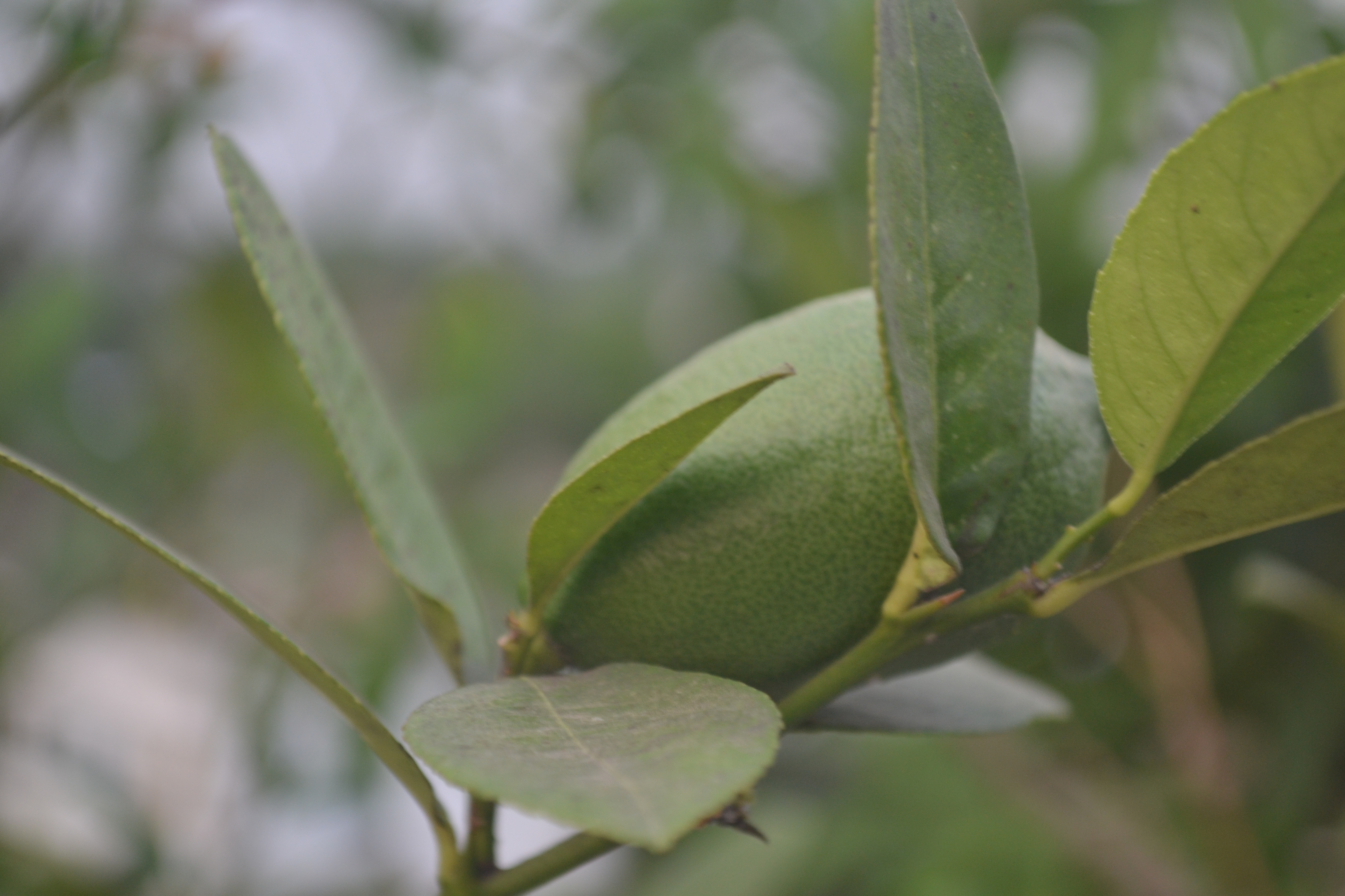 কাঁচা সবুজ লেবু